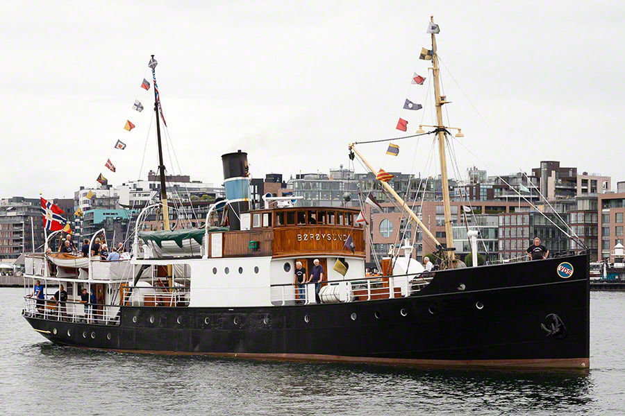 DS Børøysund i 2014 under Kystevnet i Oslo